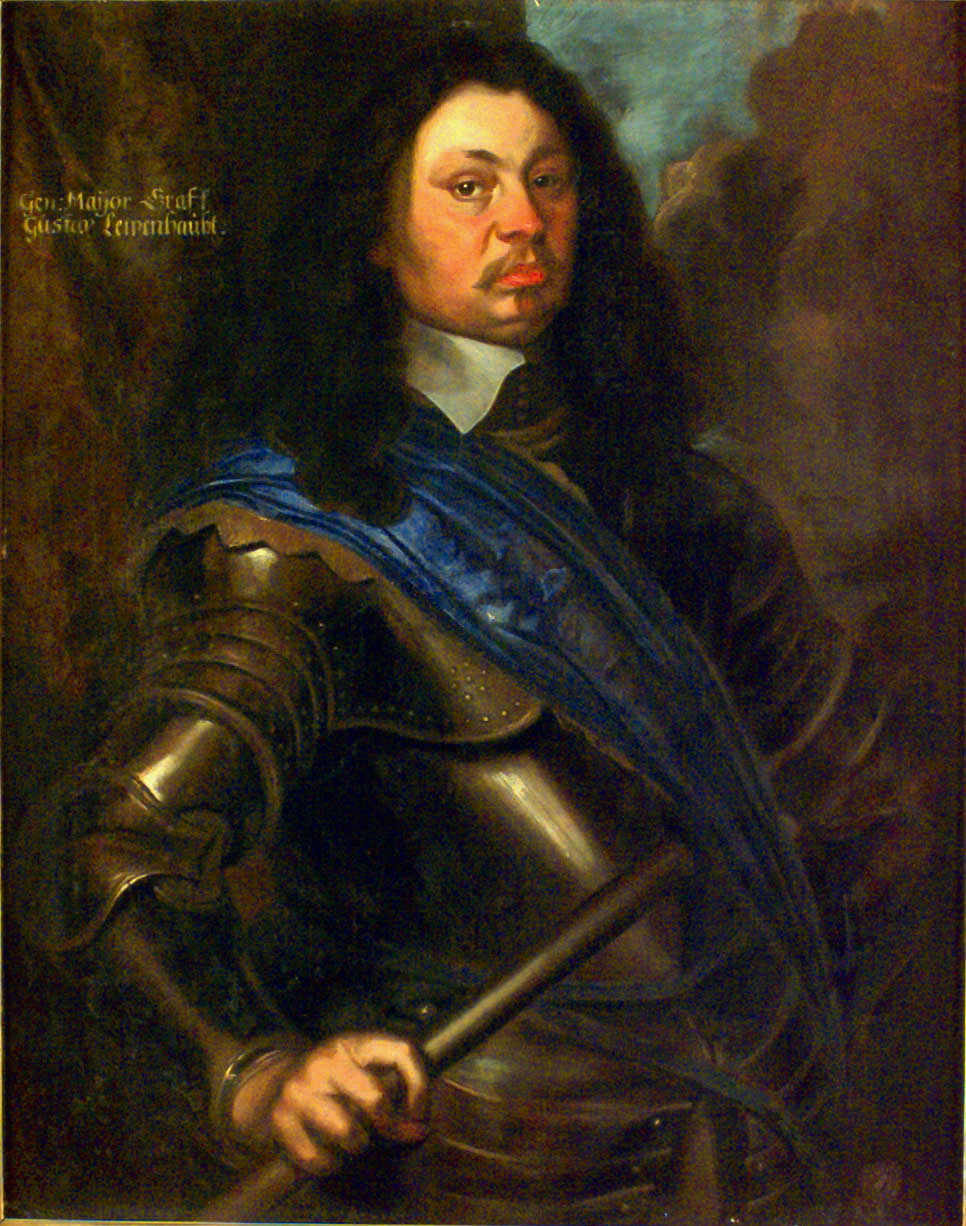 Portrait of Gustaf Adolf Lewenhaupt (1619-1656)